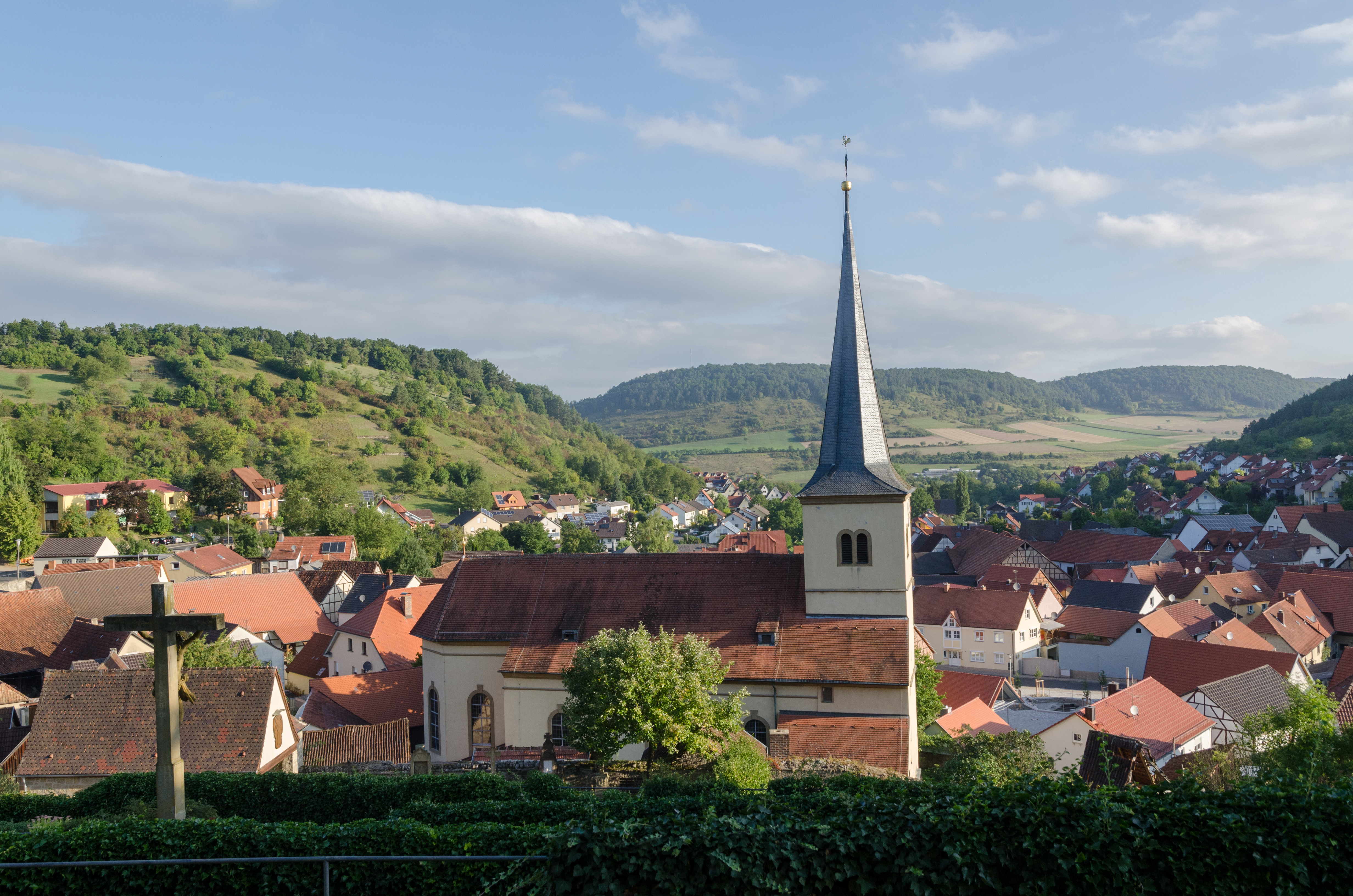 Sulzthal, Pfarrkirche von Süden